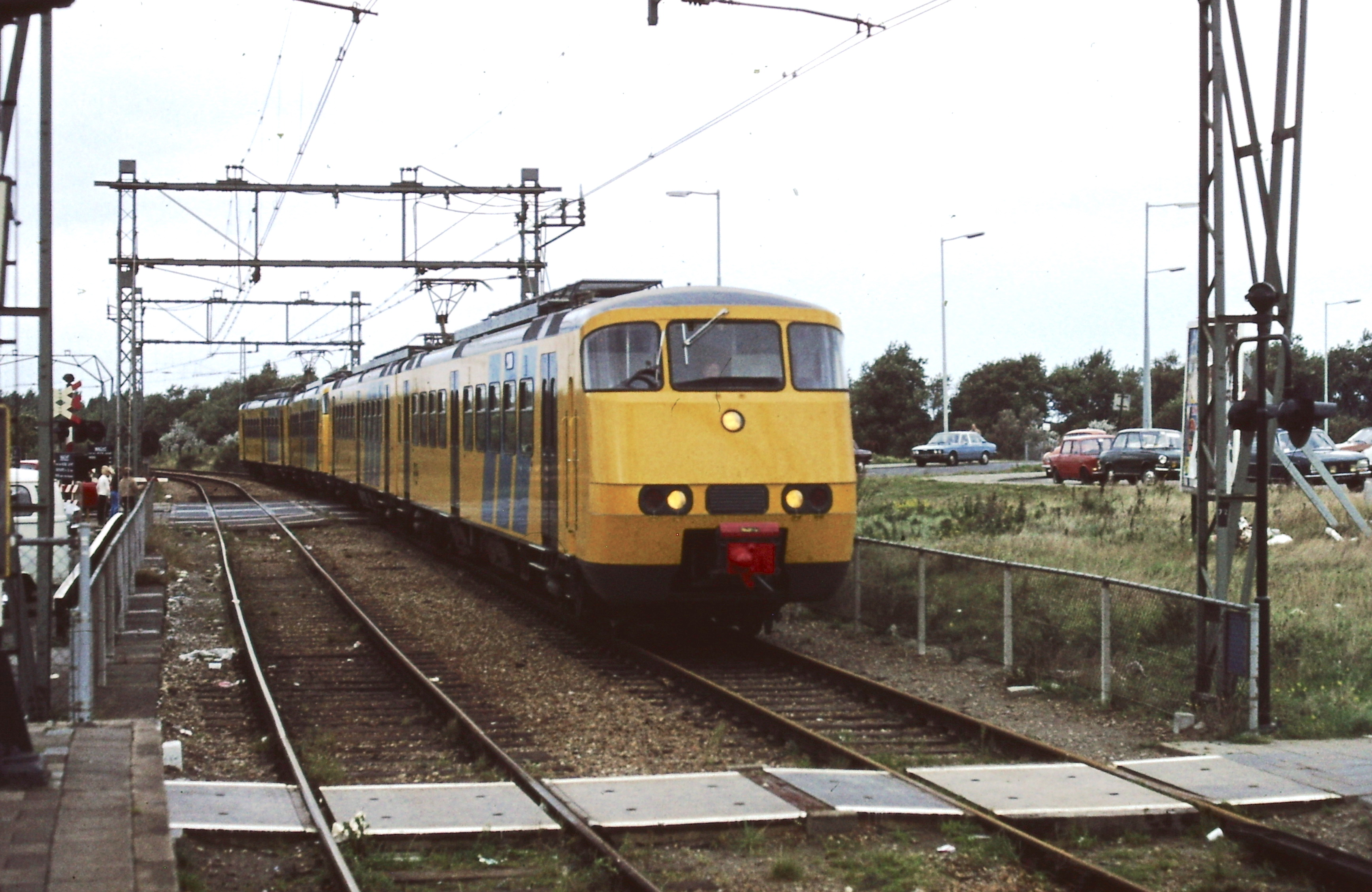 NS treinstellen van het type SGM te Hoek van Holland.